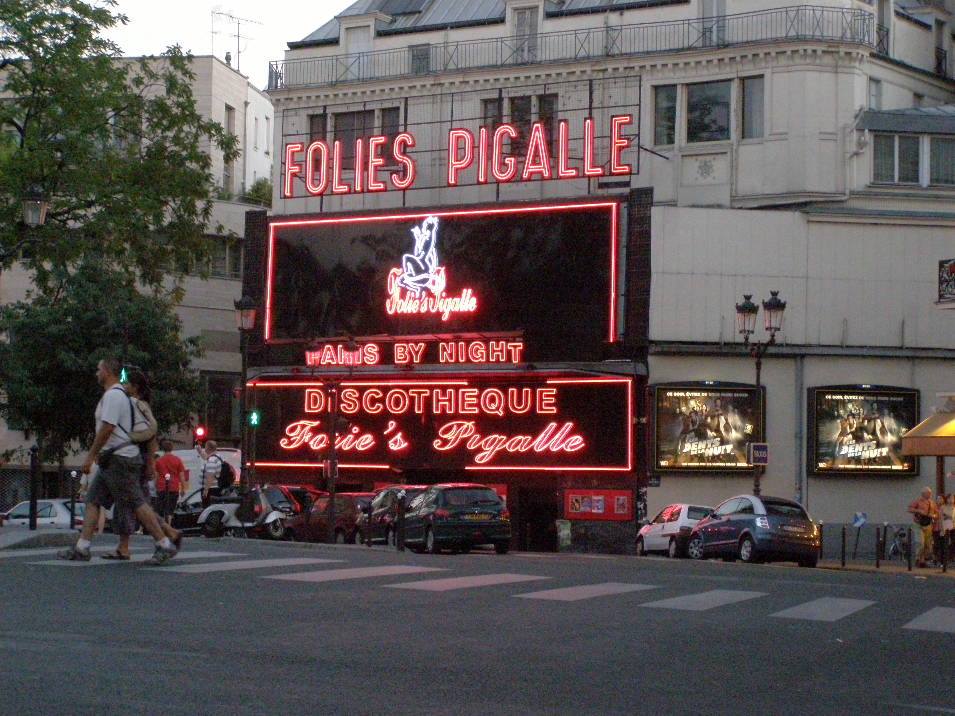 Folies Pigalle, 11 Place Pigalle, IXe arrondissement, Paris, France.